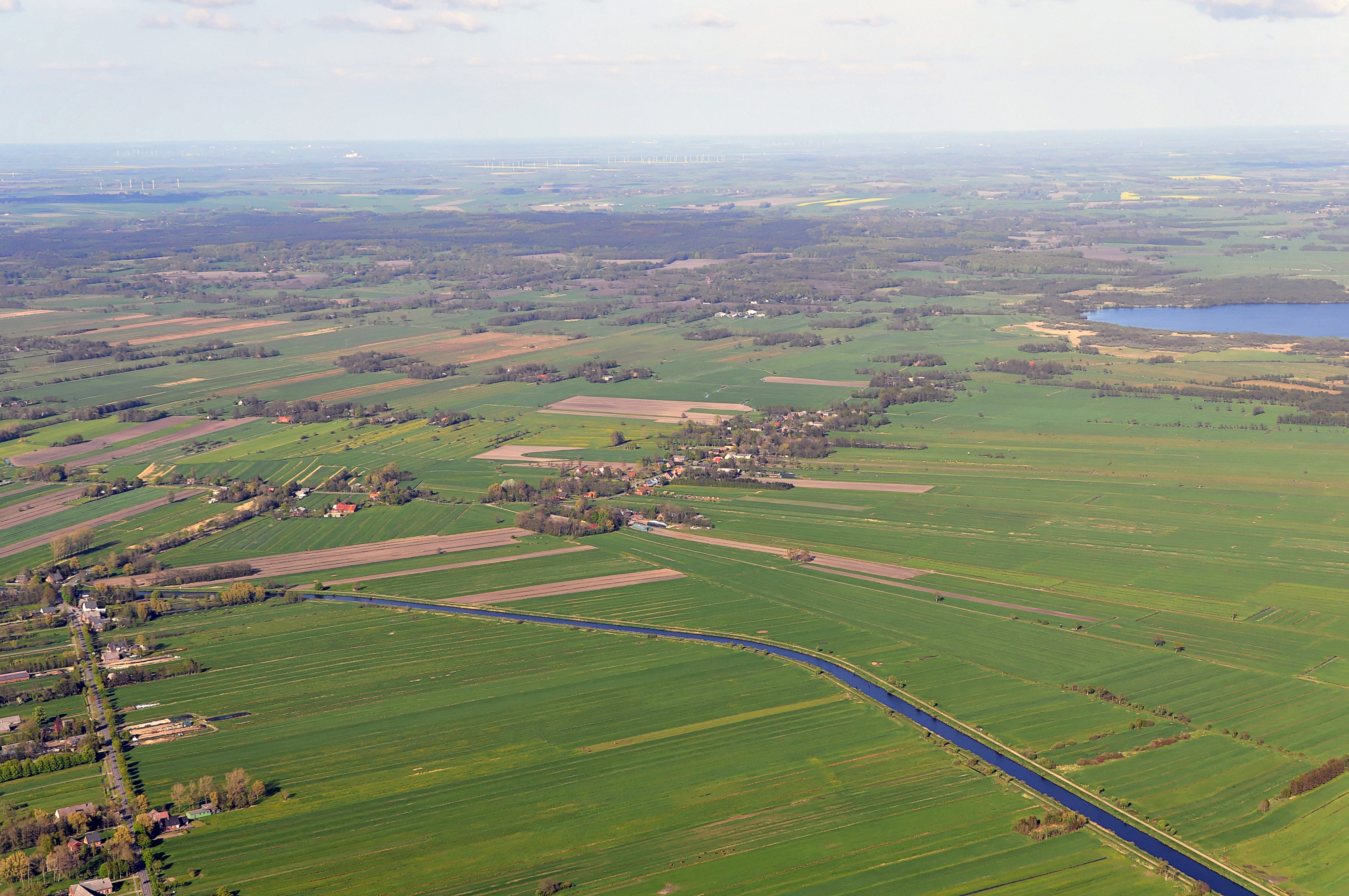 Luftbilder von der Nordseeküste 2012-05